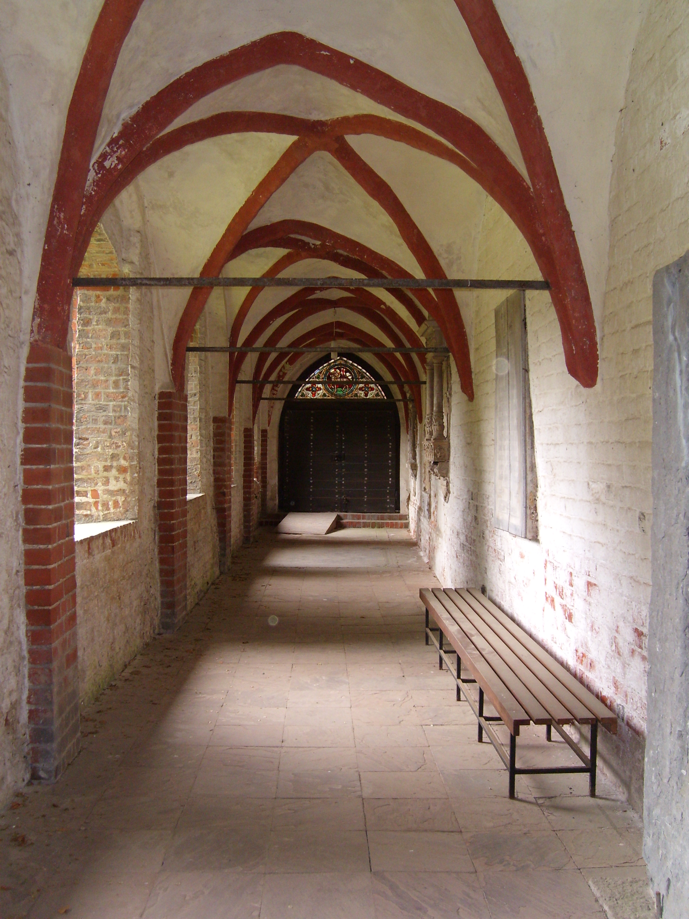 Kreuzgang des Klosters Itzehoe an der Kirche St. Laurentii